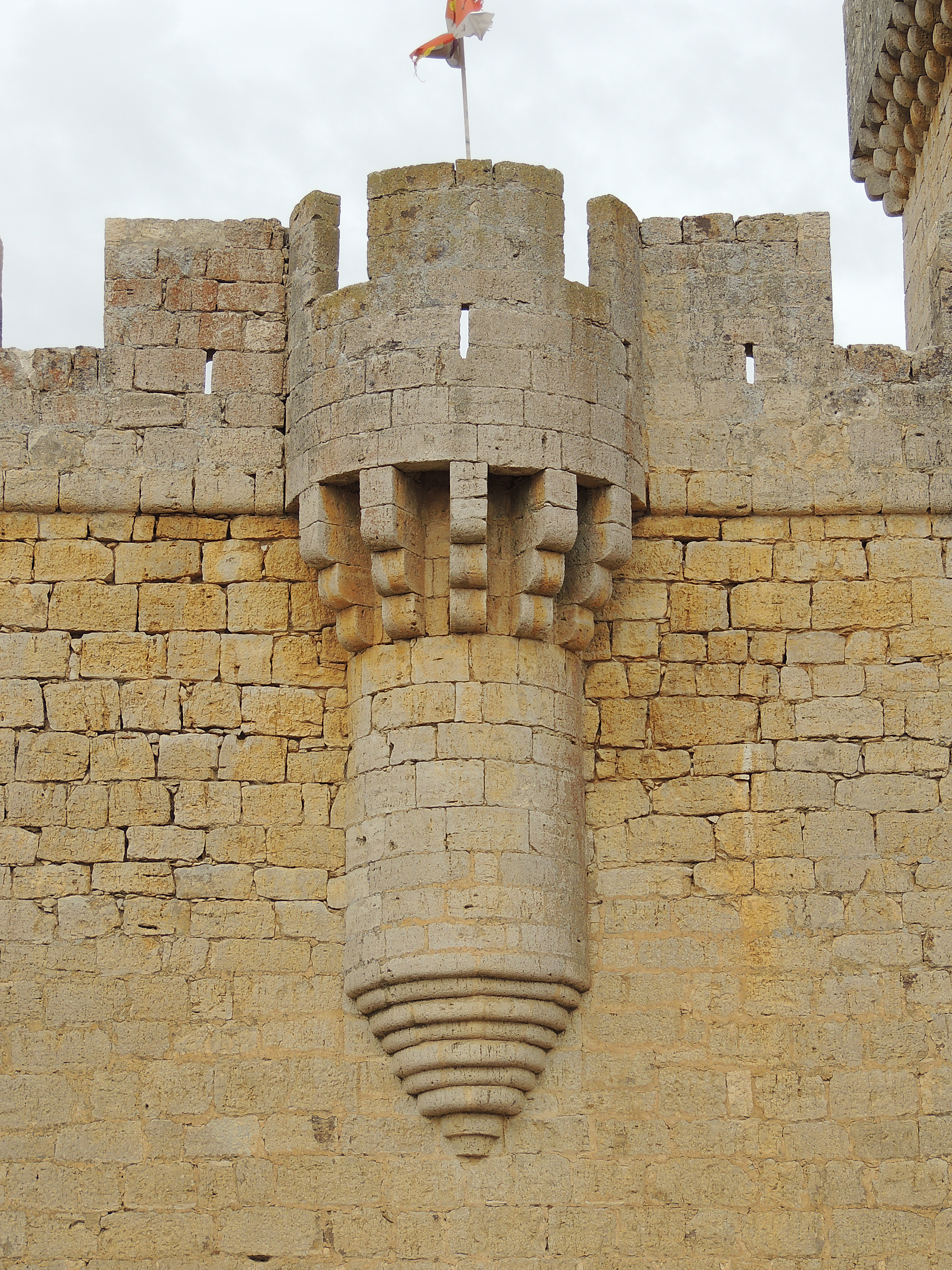 Garitón en el castillo de Villalonso